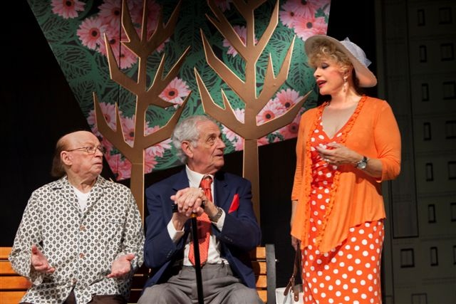 מוניקה ורדימון בהצגה ספסל הזהב מאת רון קלארק בתיאטרון יידישפיל